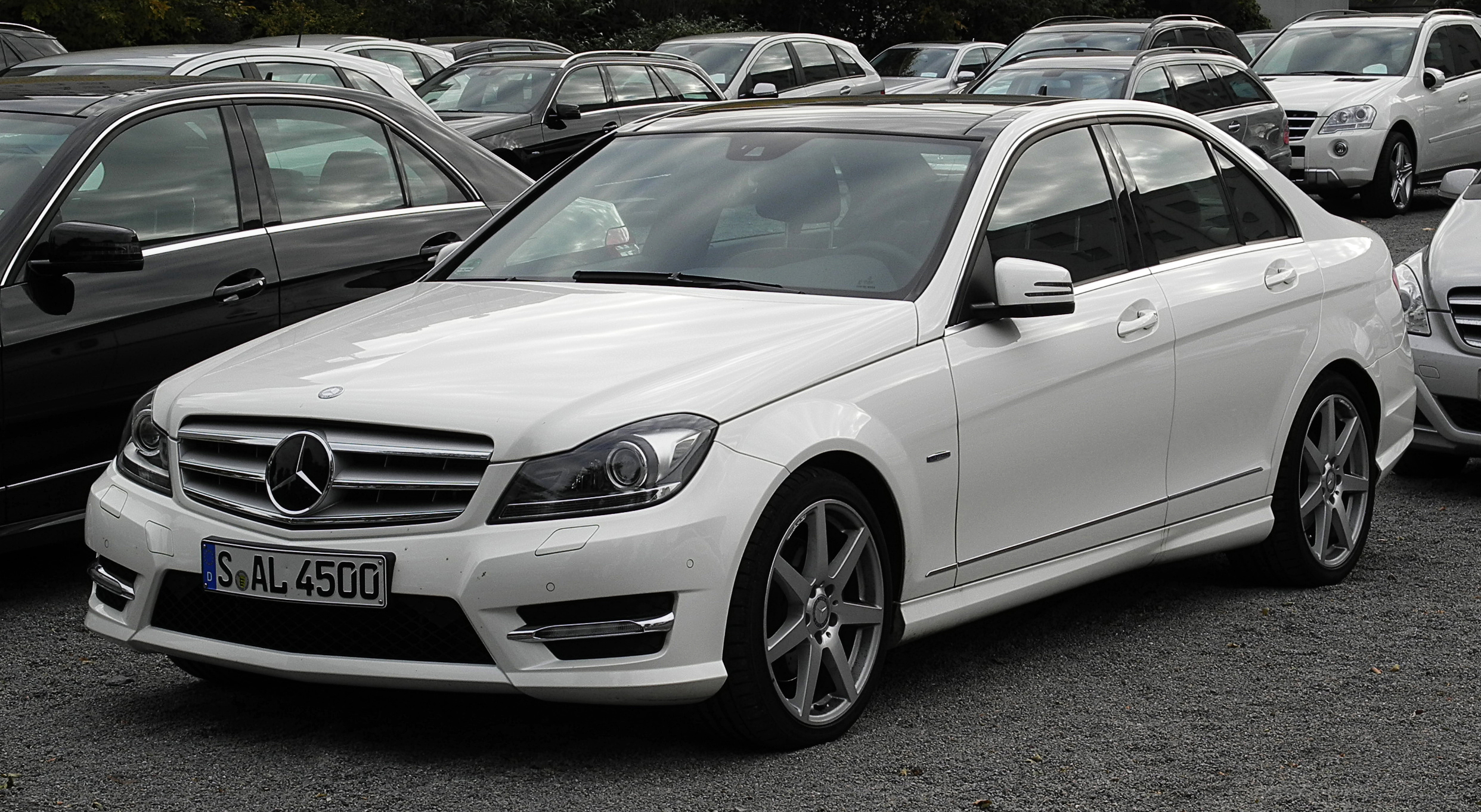 Mercedes-Benz C 350 BlueEFFICIENCY Avantgarde Sport-Paket AMG (W 204, Facelift)